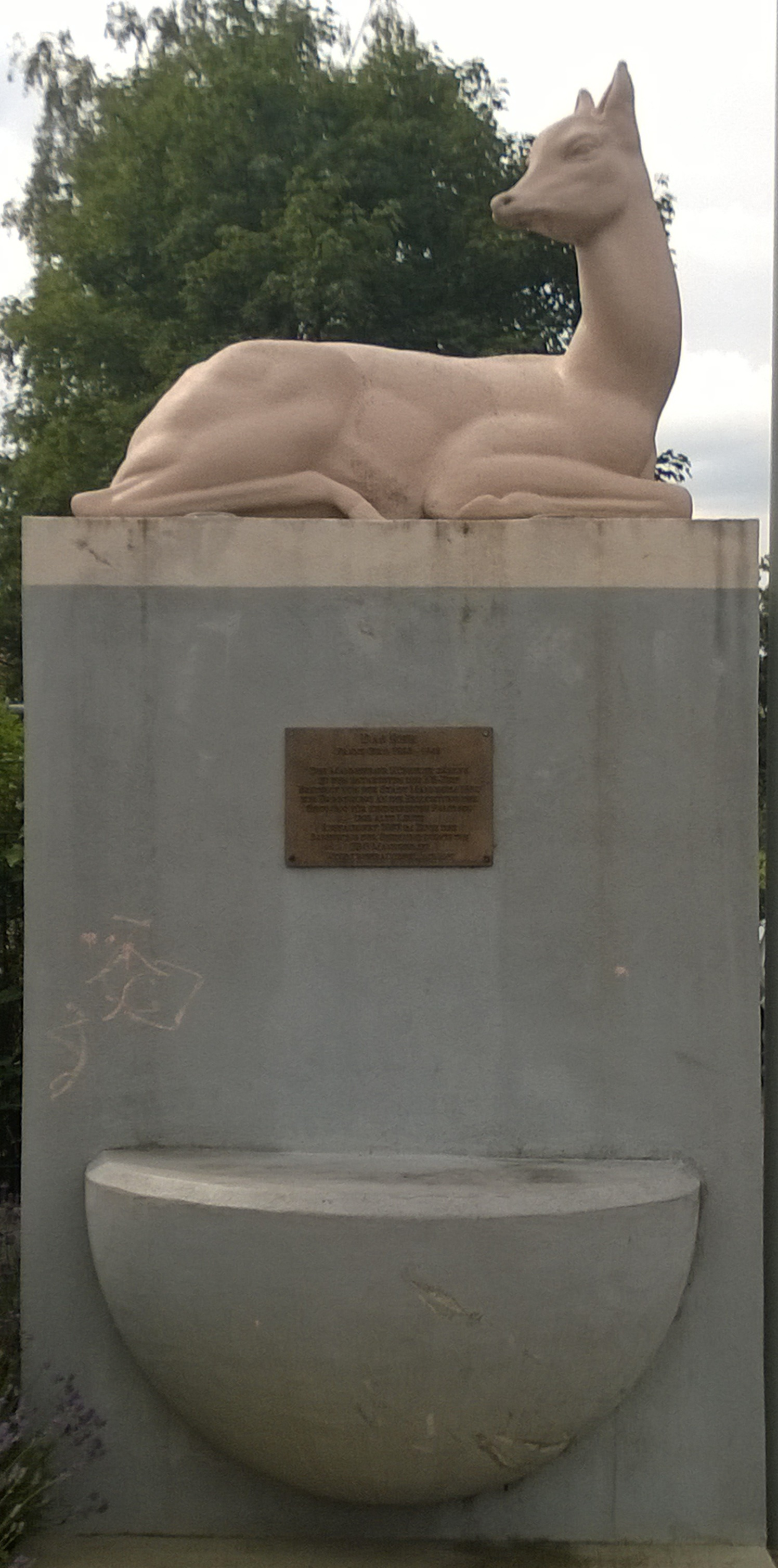 Kunst in Mannheim-Waldhof